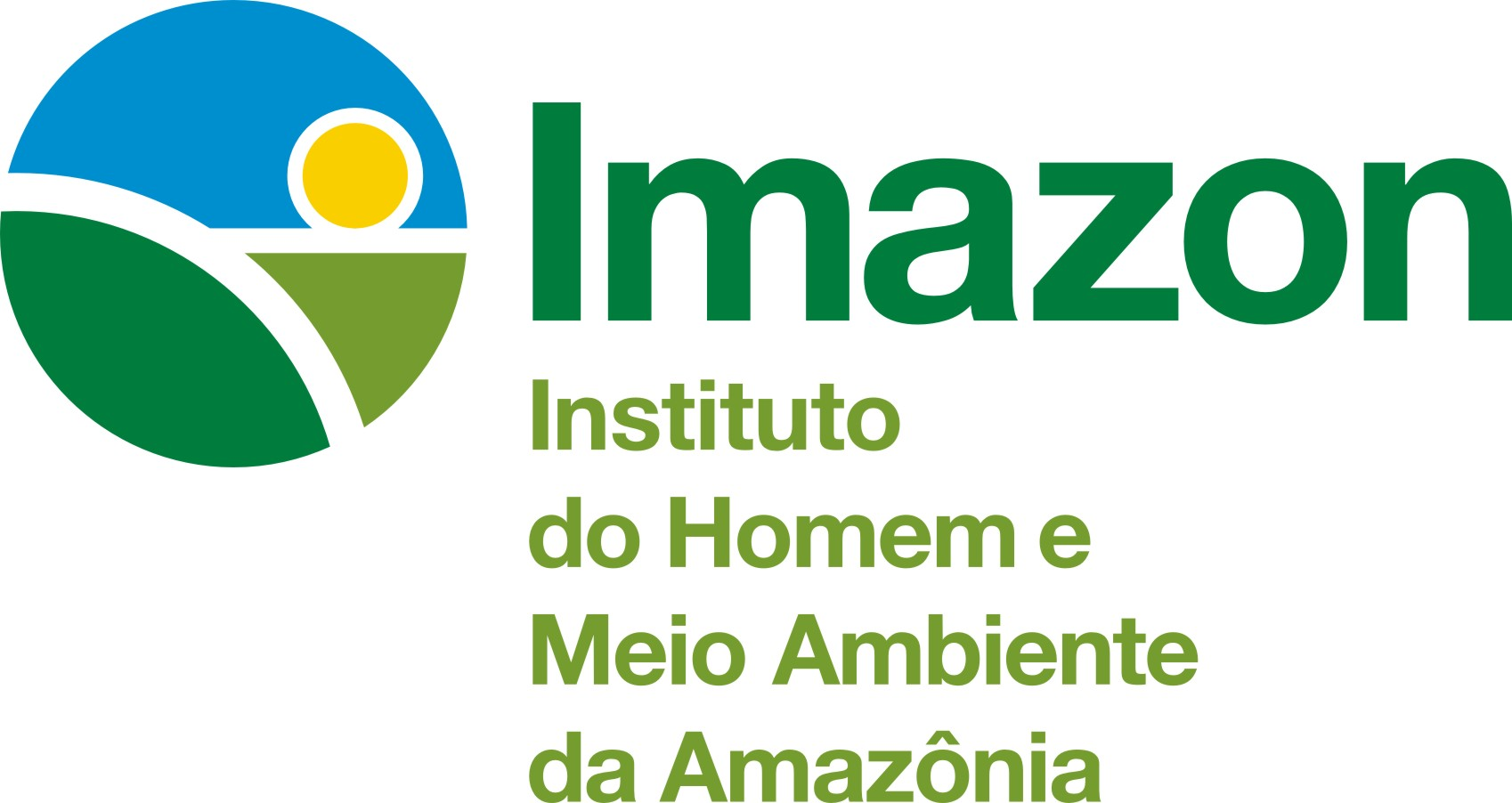 Marca do Instituto